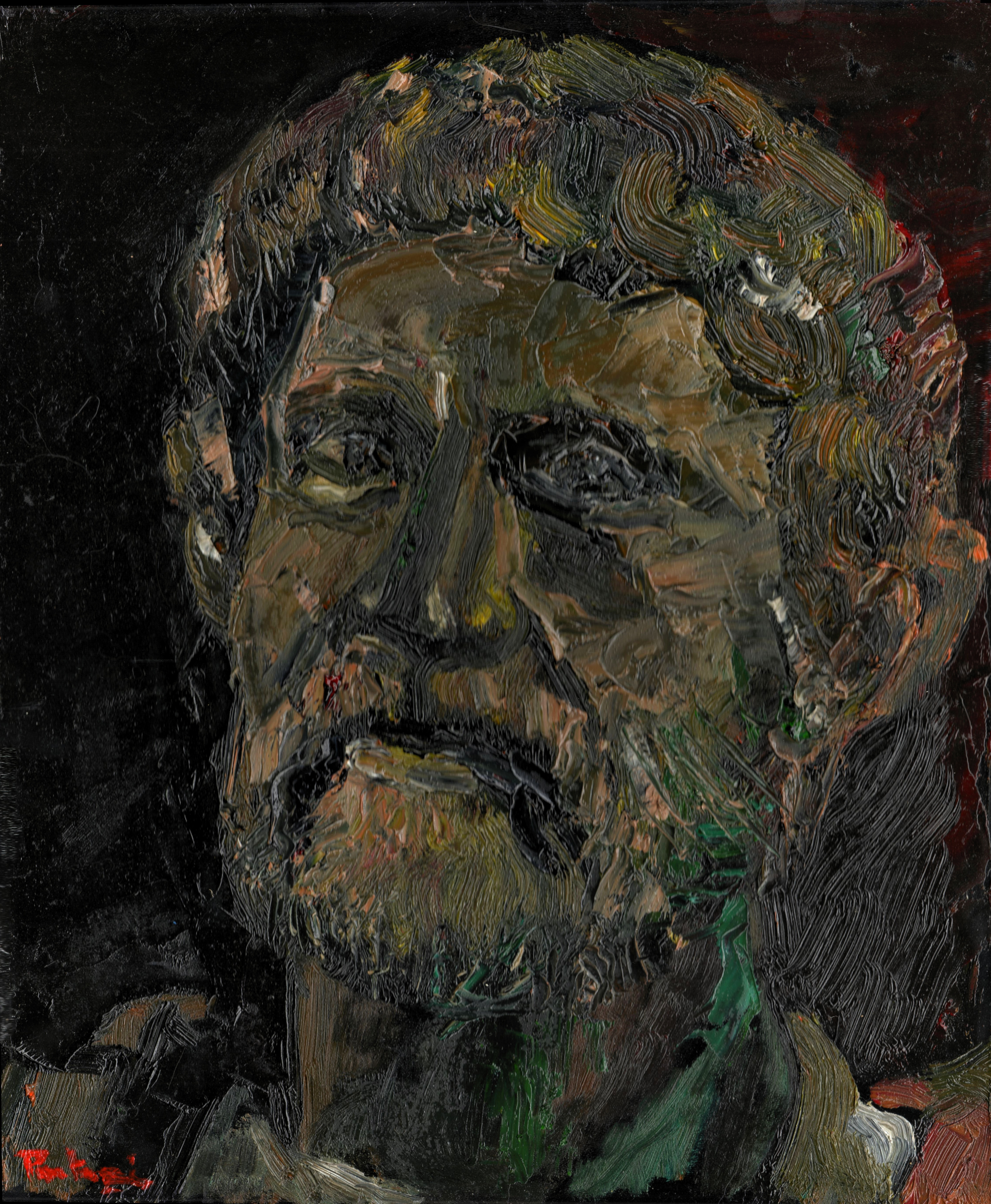 Portretul împăratului Hadrian realizat de Valeriu Pantazi